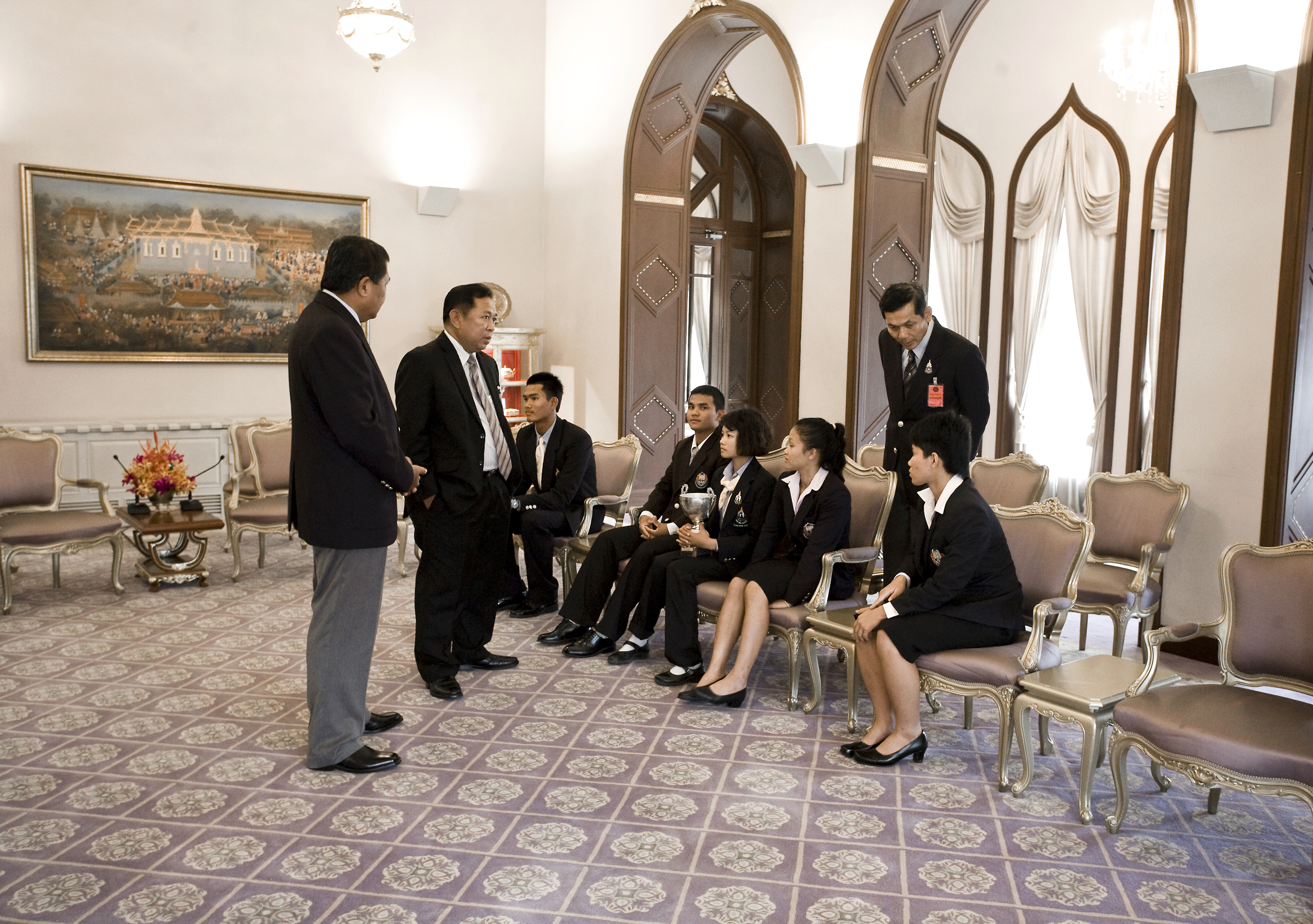 คุณนพเก้า พูนพัฒน์ แชมป์โลกเรือใบออพติมิสต์หญิง 2009 คุณนพดล แสงคำ แชมป์สนุ้กเกอร์เยาวชนชิงแชมป์โลก 2552 คุณกีรติ บัวลง แชมป์เรือใบเยาวชนโลกและคุณศุขสวัสดิ ณ อยุธยา แชมป์กระโดดไกลจากกรีฑาเยาวชนโลก เข้าพบนายกรัฐมนตรี ณ ห้องสีม่วง ตึกไทยคู่ฟ้า ทำเนียบรัฐบาล 28สิงหาคม2552 (The Official Site of The Prime Minister of Thailand Photo by พีรพัฒน์ วิมลรังครัตน์)